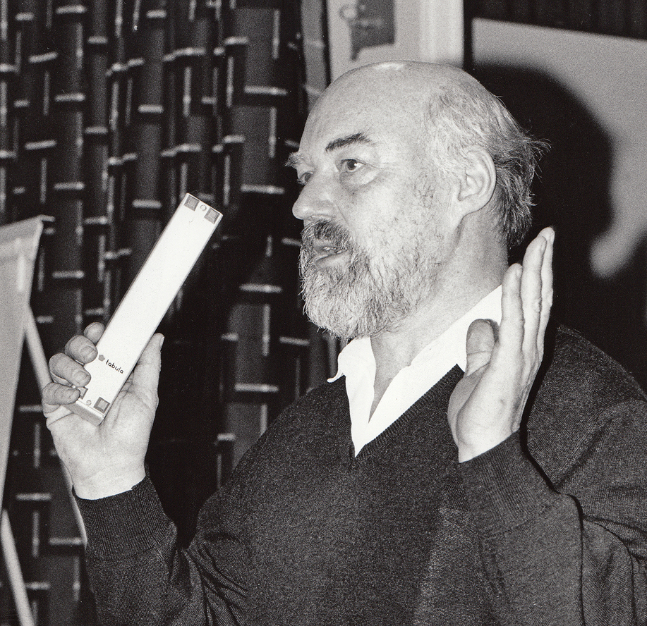 Lars Westman föreläser i Malmö 1994.